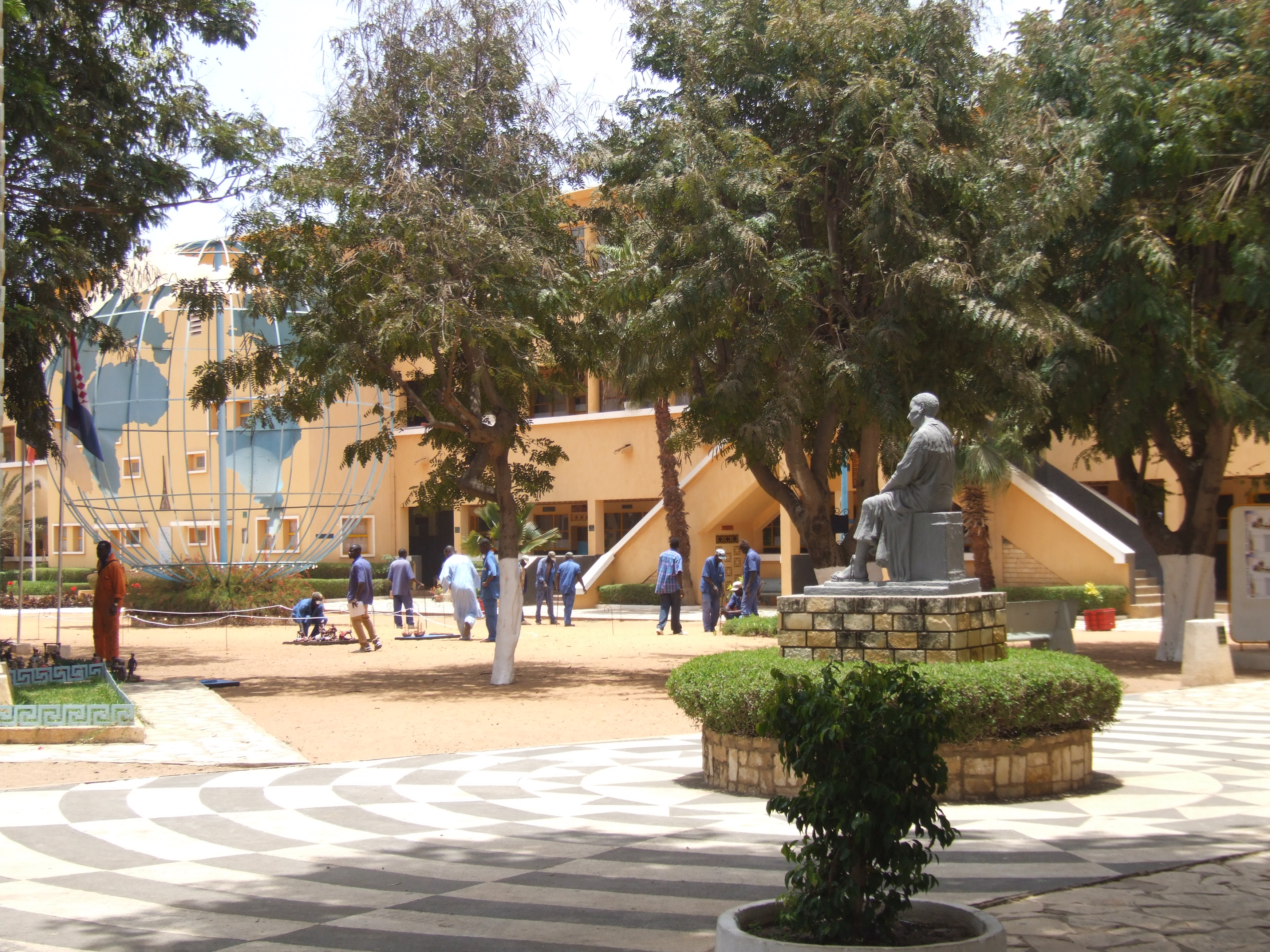 Cours Sainte-Marie de Hann (Dakar, Sénégal)